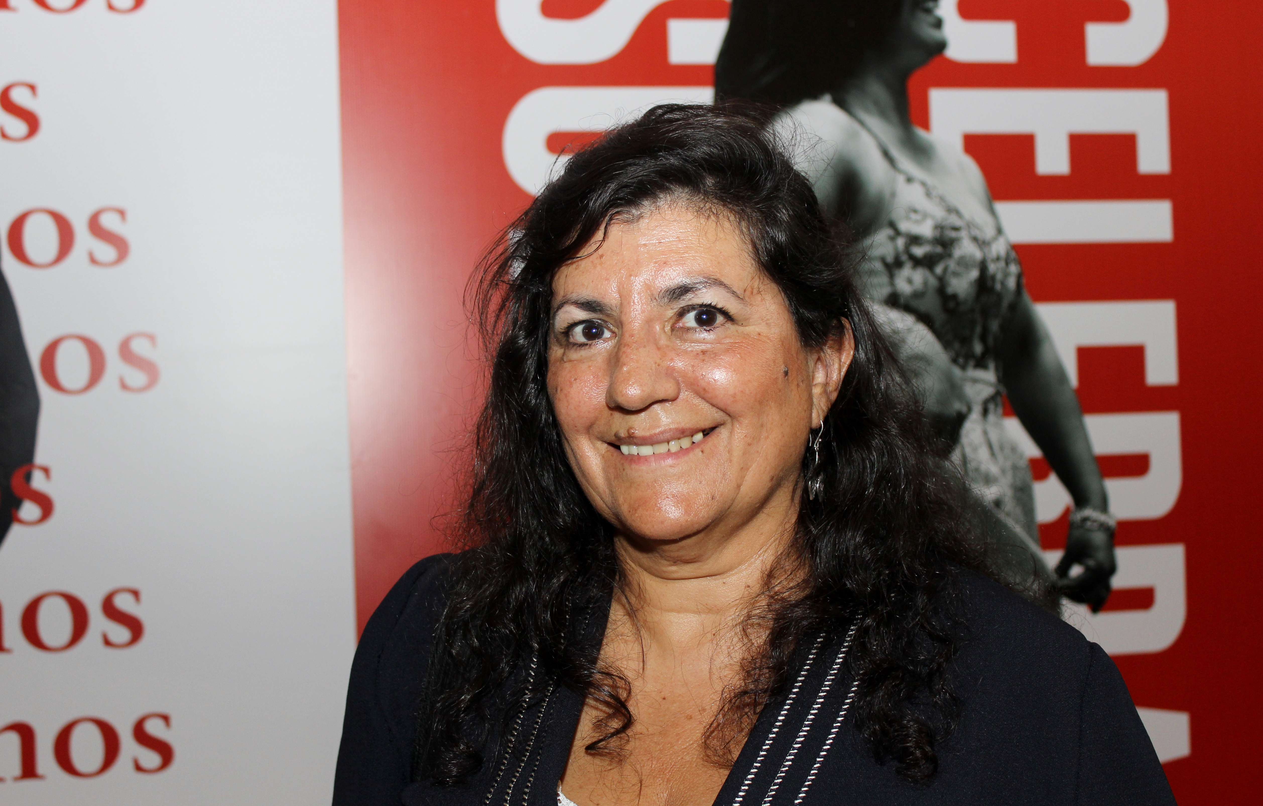 La escritora peruana Teresa Ruiz Rosas en la Feria Internacional del Libro de Santiago 2018.